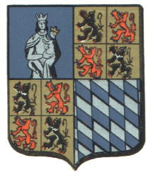 Wapenschild van de stad Halle.